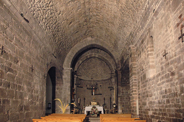 Interior de l'església de Sant Esteve de Llanars